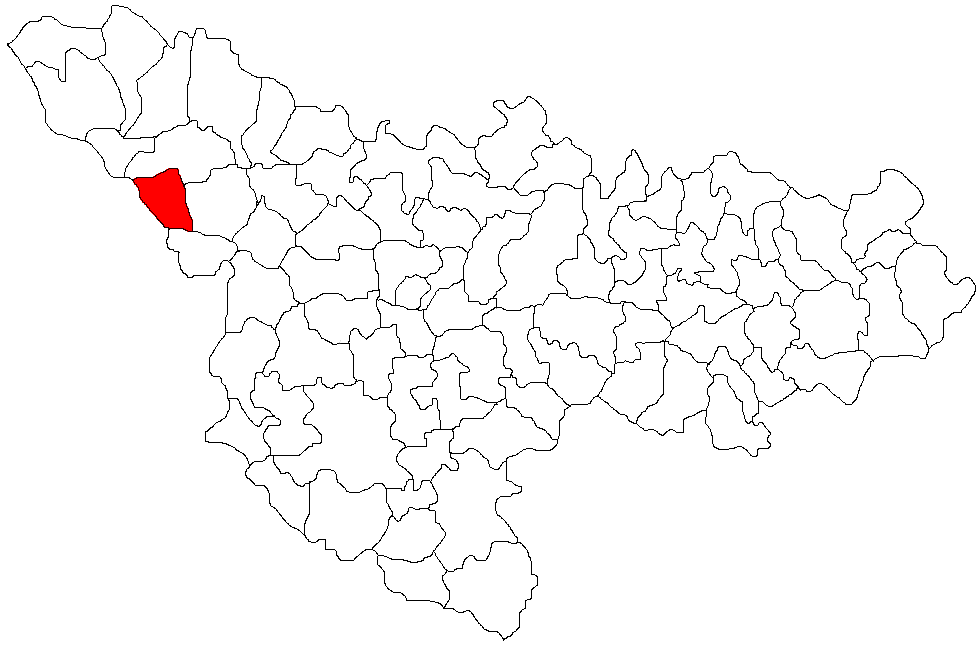 Harta judetului Timis; evidentiata comuna Comlosu Mare Licensing Categorie:Hărţi ale judeţului Timiş